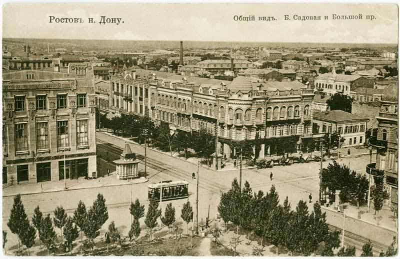 Ростов-на-Дону улица Большая Садовая Доходный дом Мелконова-Езекова